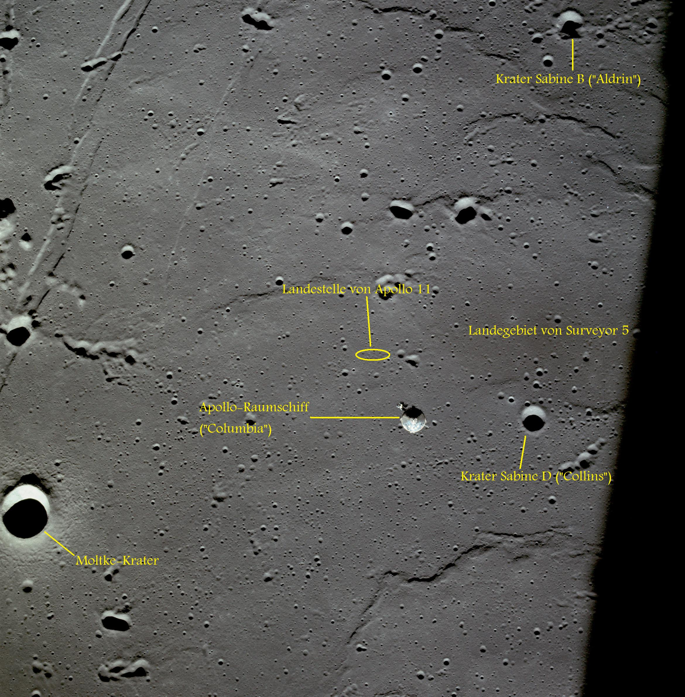 Landestelle der Apollo-11-Mondfähre im Meer der Ruhe. Das Foto zeigt das Apollo-Raumschiff sowie die Moltke- und Sabine-Krater.